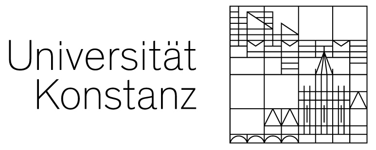 Logo der Universität Konstanz